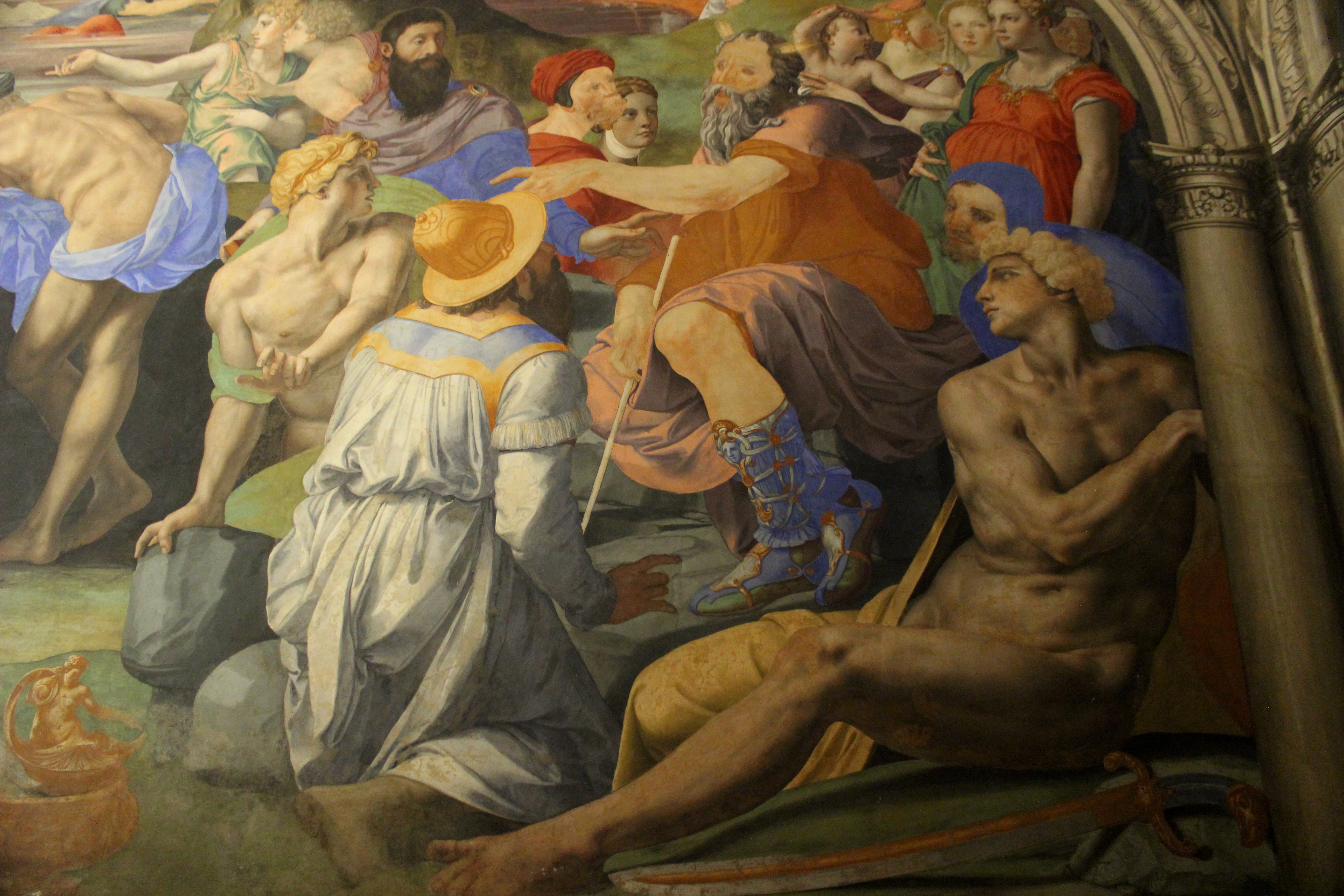 Florencia, Palazzo Vecchio. Capilla de Leonor de Toledo.